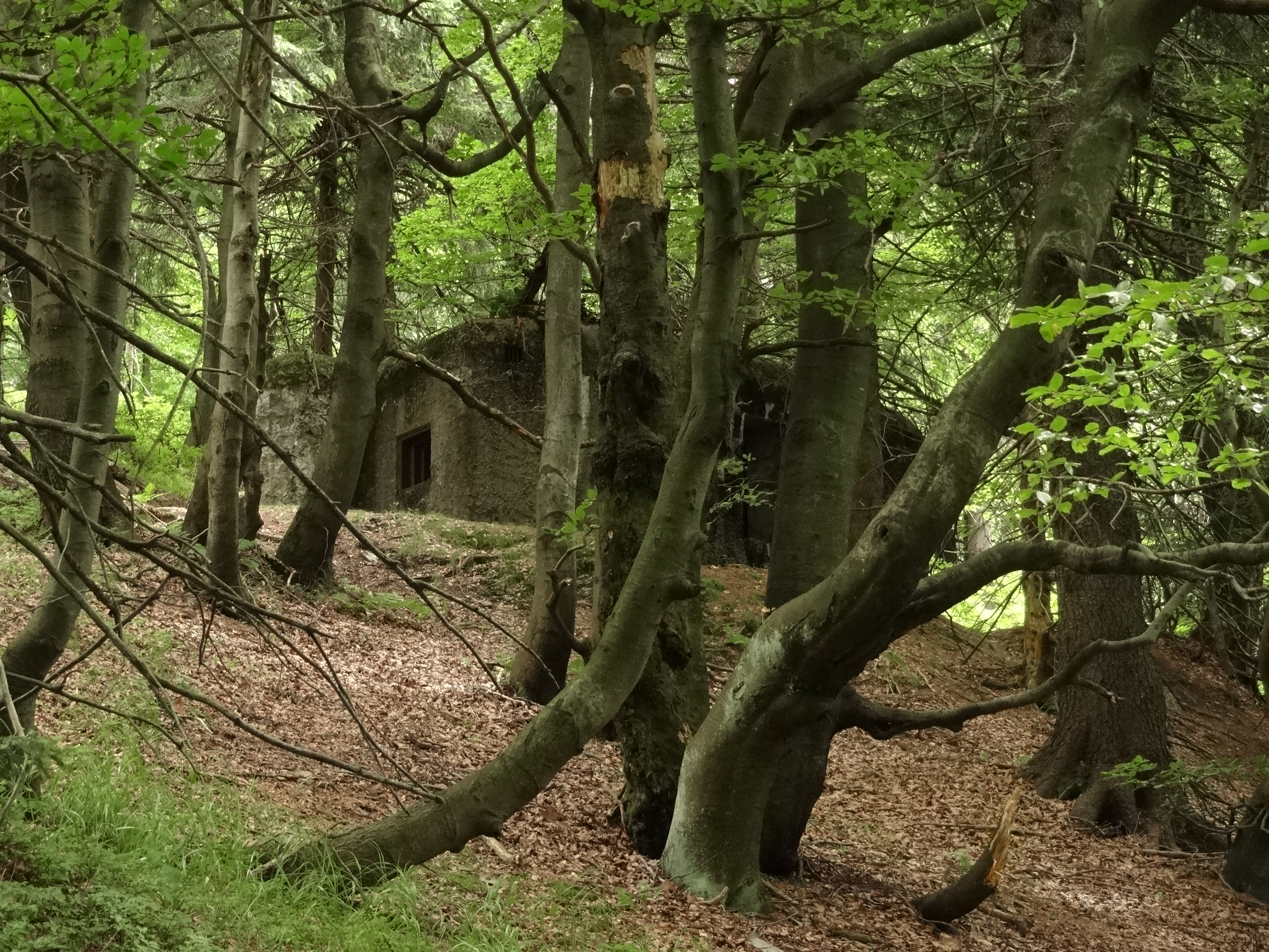 PR Sedloňovský vrch